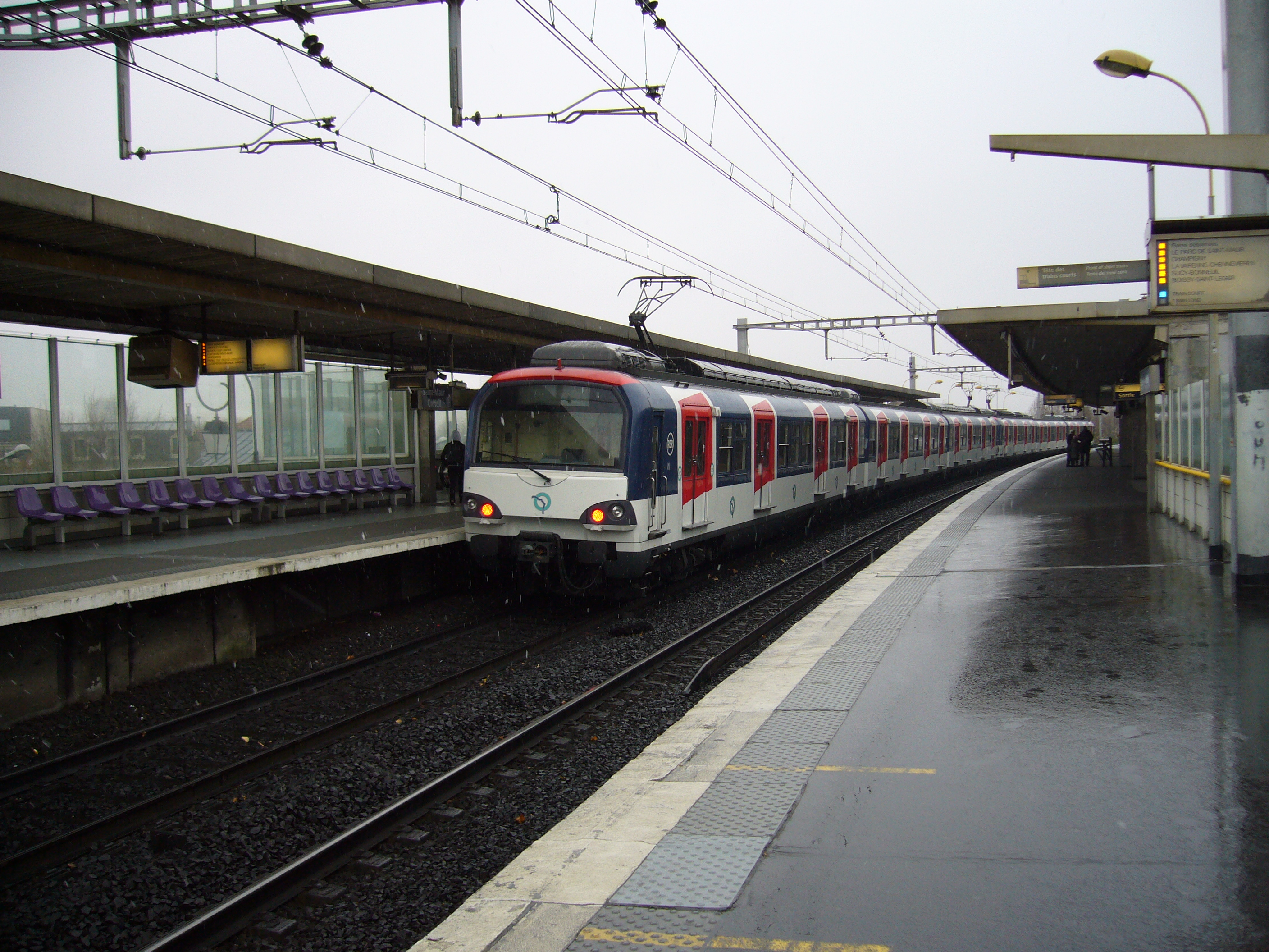 Un MS 61 quitte la gare de Saint-Maur Créteil sur la ligne A du RER d'Île-de-France.